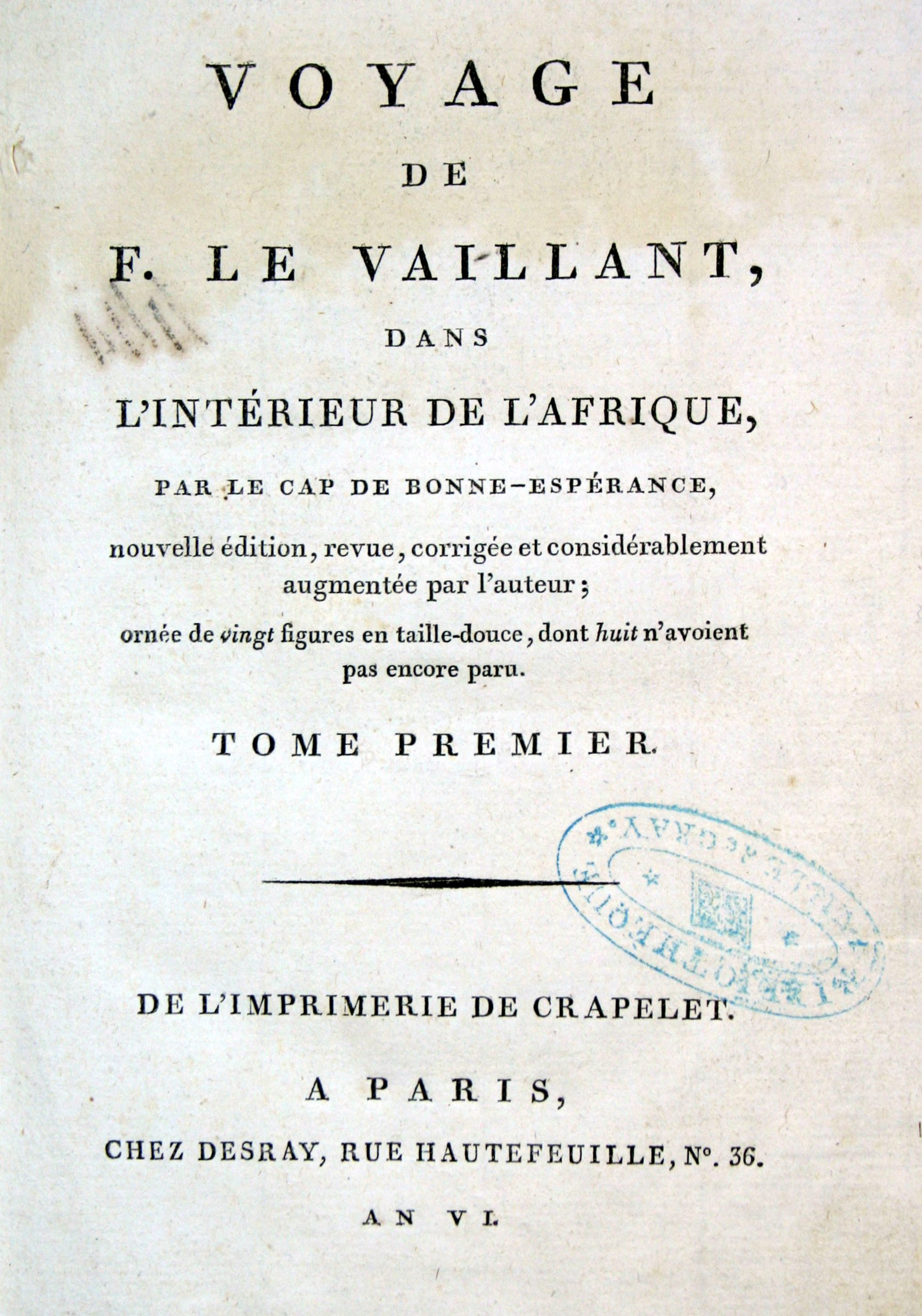 Page de titre du Voyage de F. Le Vaillant dans l'intérieur de l'Afrique par le cap de Bonne Espérance nouvelle édition, Desray, An VI.